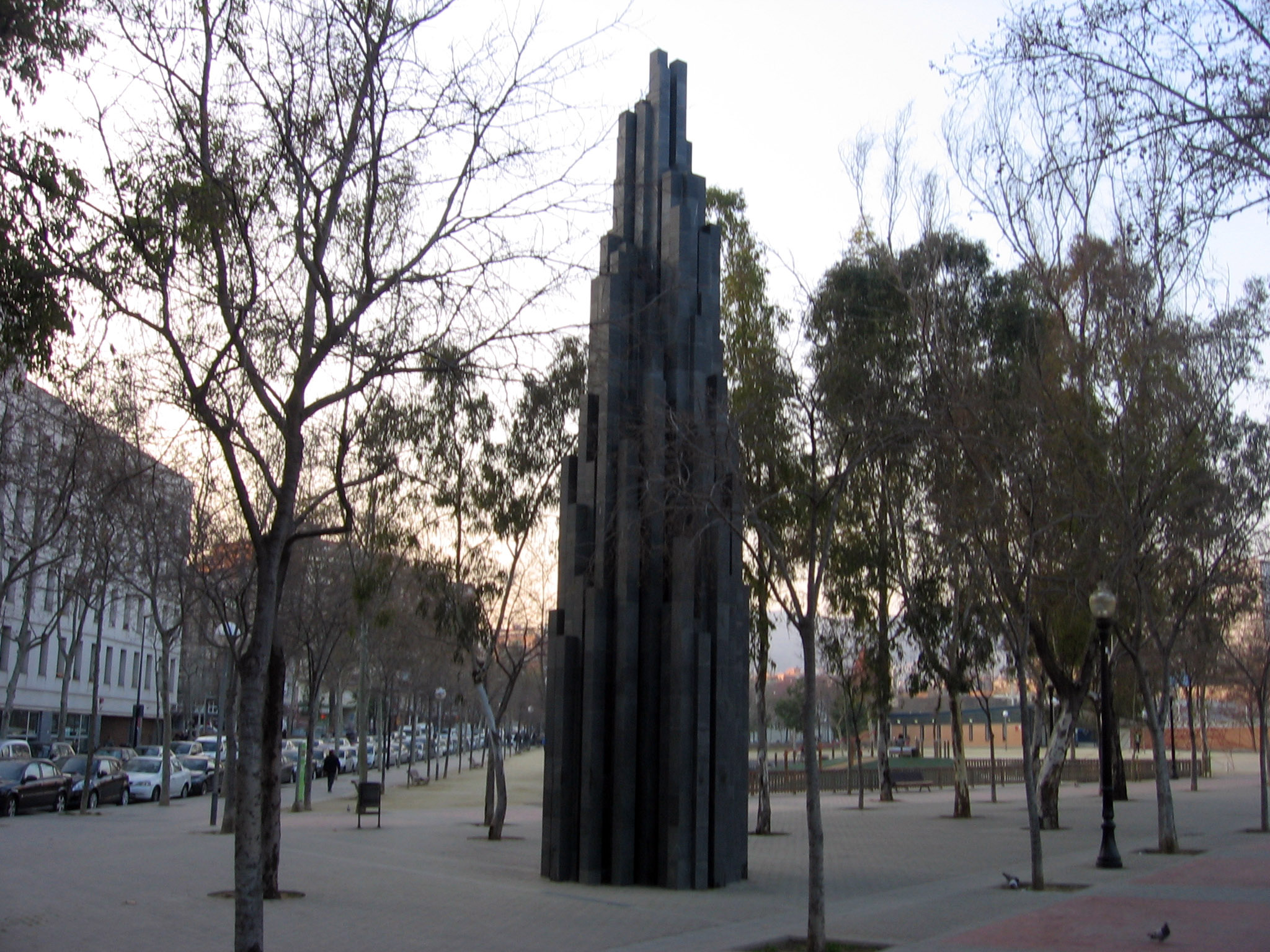 Tall Irregular Progression. A las víctimas del terrorismo (2003), de Sol LeWitt, Avenida Meridiana.